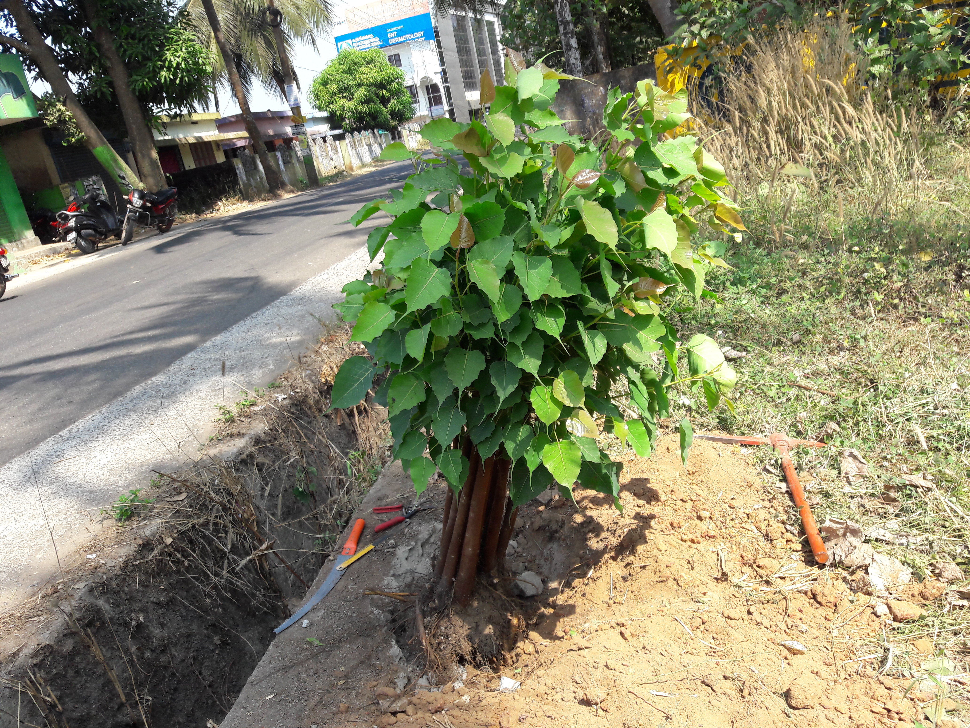 മലപ്പുറം ജില്ലയിലെ പൊന്നാനി താലൂക്കില്‍ വെളിയംകോട് സ്കൂള്‍ പടിയില്‍ പ്രവര്‍ത്തിക്കുന്ന പ്ലാന്‍റ് വില്ലേജ് ചാരിറ്റബിള്‍ സൊസൈറ്റി (Plant village charitable society)എന്ന നേച്ചര്‍ ക്ലബ് പ്രവര്‍ത്തകര്‍ ഒരു അരയാല്‍ മരത്തെ ദത്തെടുത്ത് സംരക്ഷിക്കുന്നു.Peepal tree ശാസ്ത്രീയ നാമം Ficus religiosa കുടുംബം Moraceae.